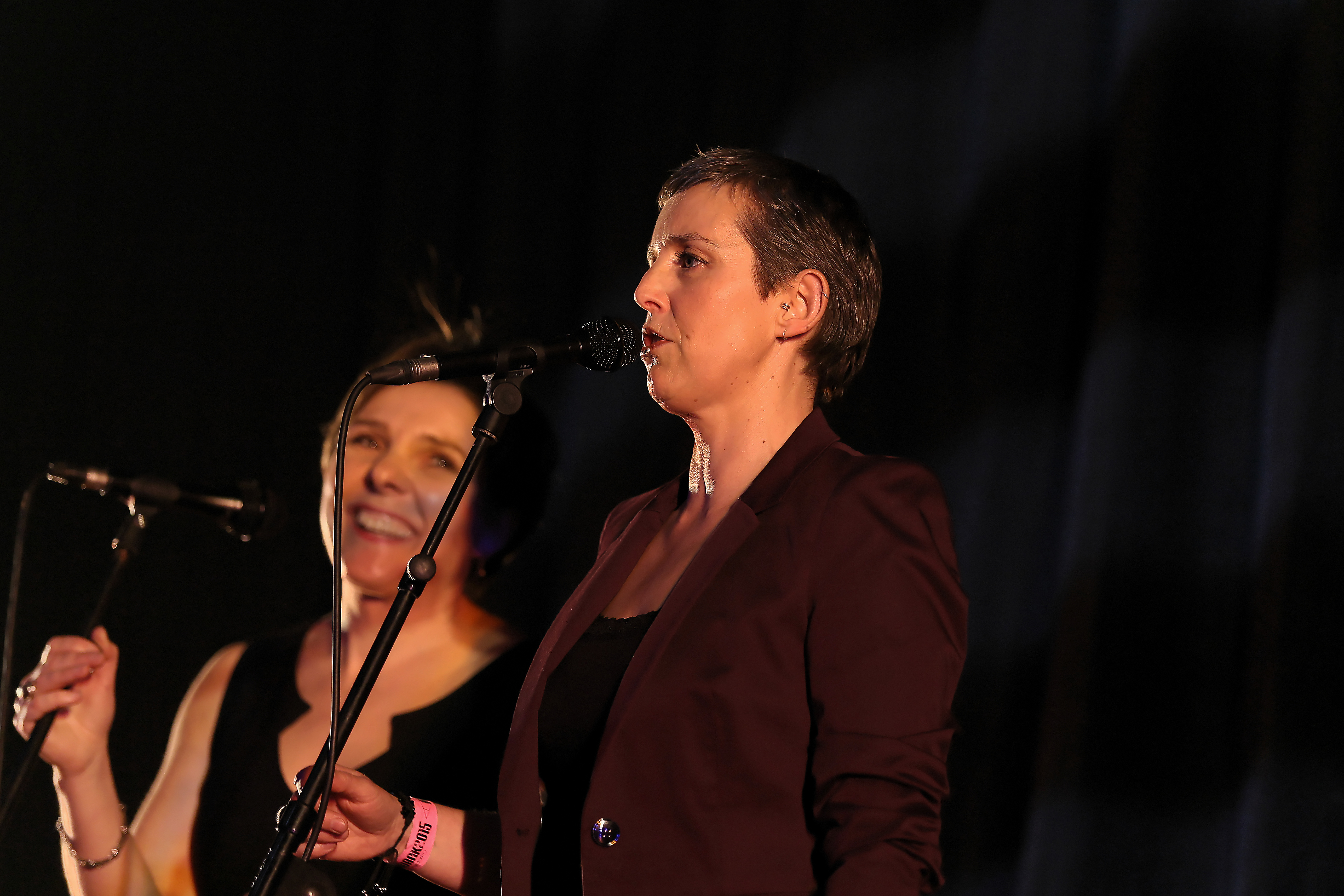 Annie Ebrel et Nolùen Le Buhé en fest-noz lors du festival Yaouank le 21 novembre 2015 au Parc des Expositions de Rennes.